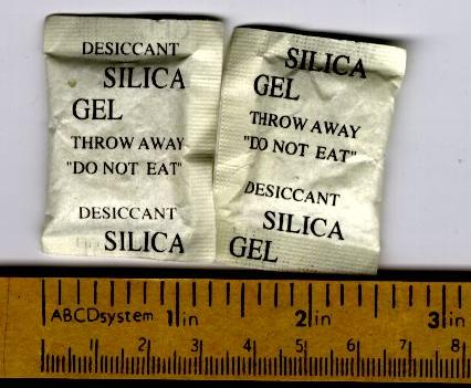 Bildbeschreibung: Zwei Antikondensationsbeutel Quelle: selbst gescannt Fotograf/Zeichner: Kommerzgandalf Datum: 20060207